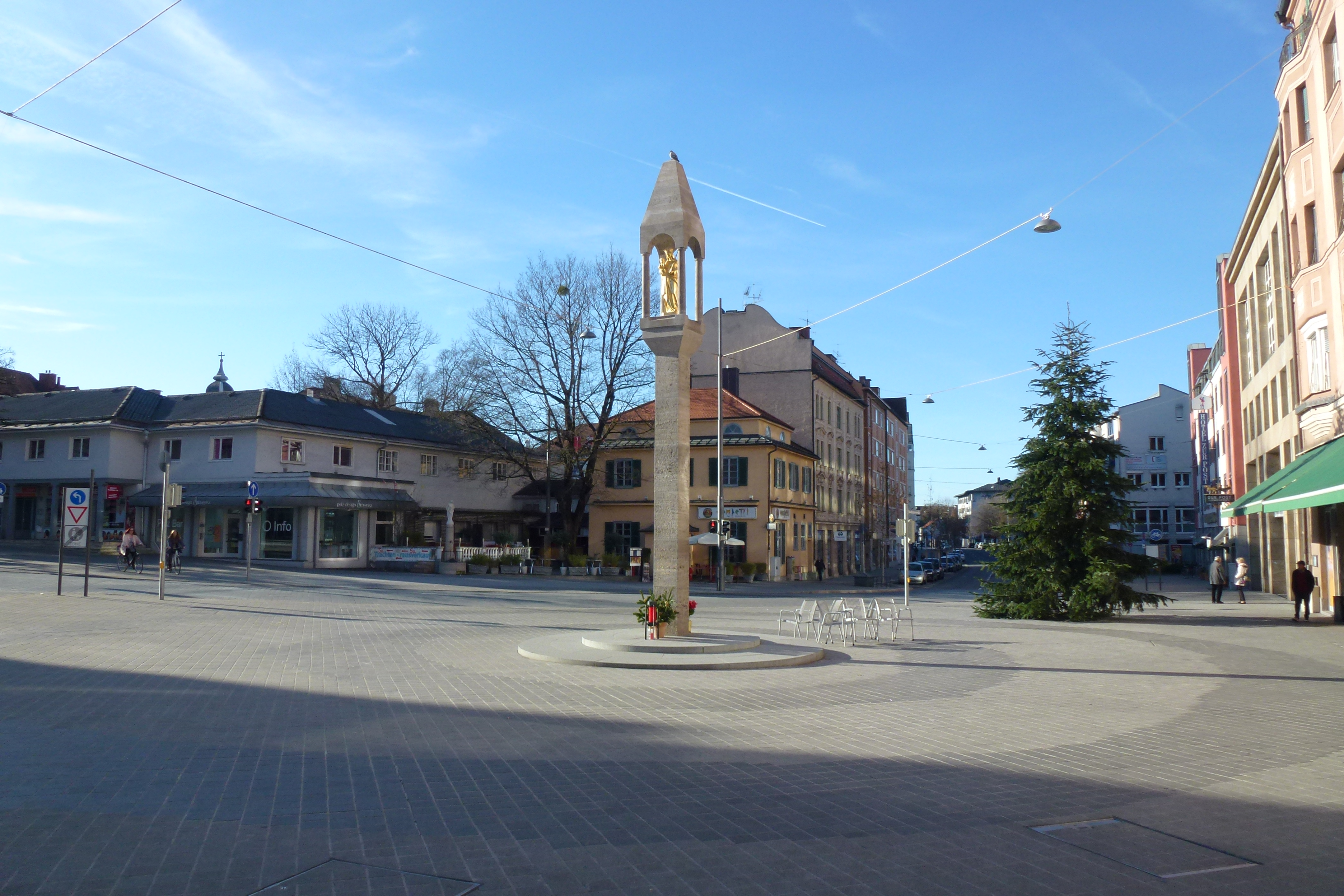 Ansicht des Pasinger Marienplatzes (der Blick geht Richtung Südwesten)